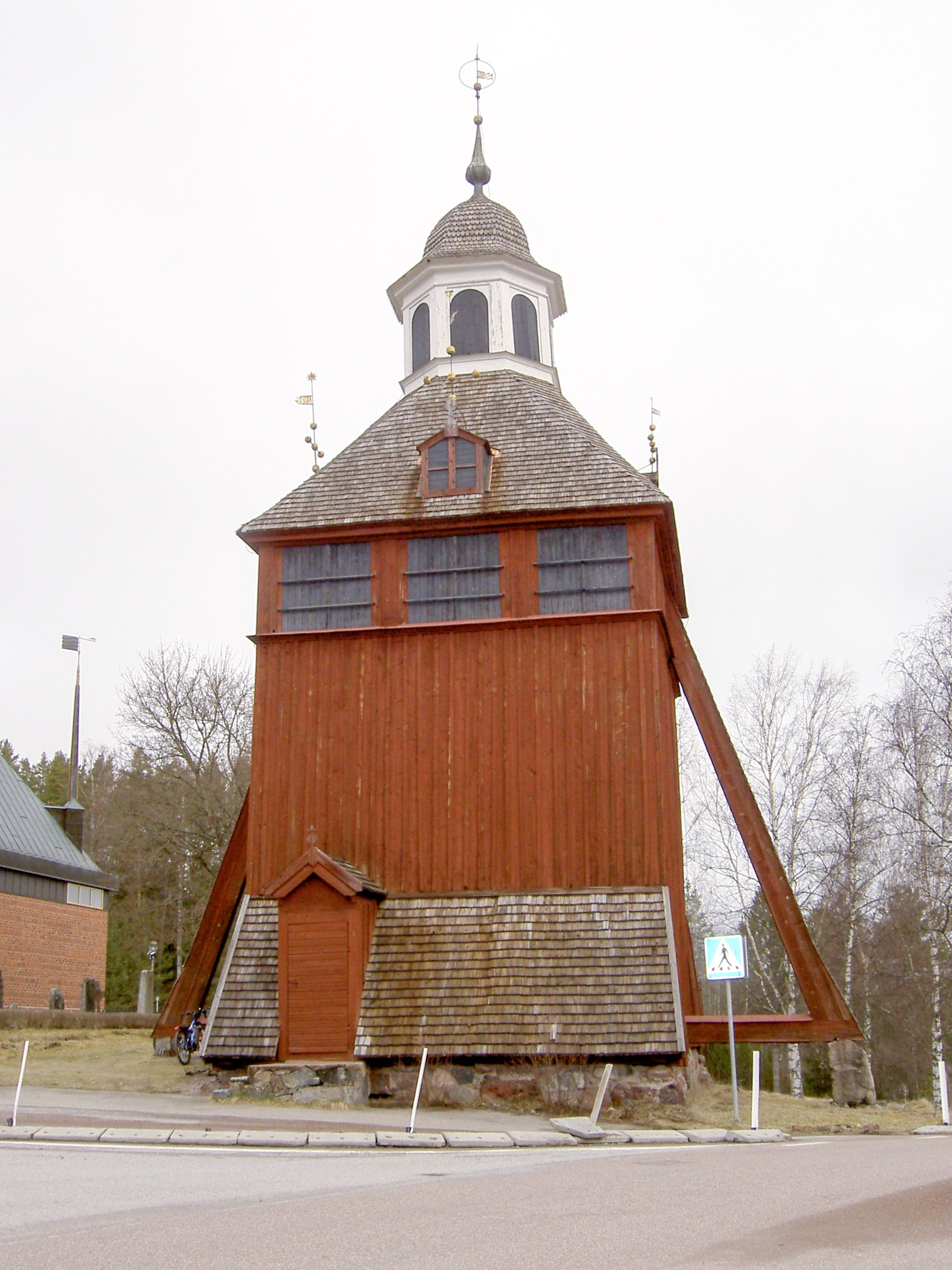 Aspeboda kyrkas klockstapel/Campanile of Aspeboda church, Aspeboda, Sverige/Sweden